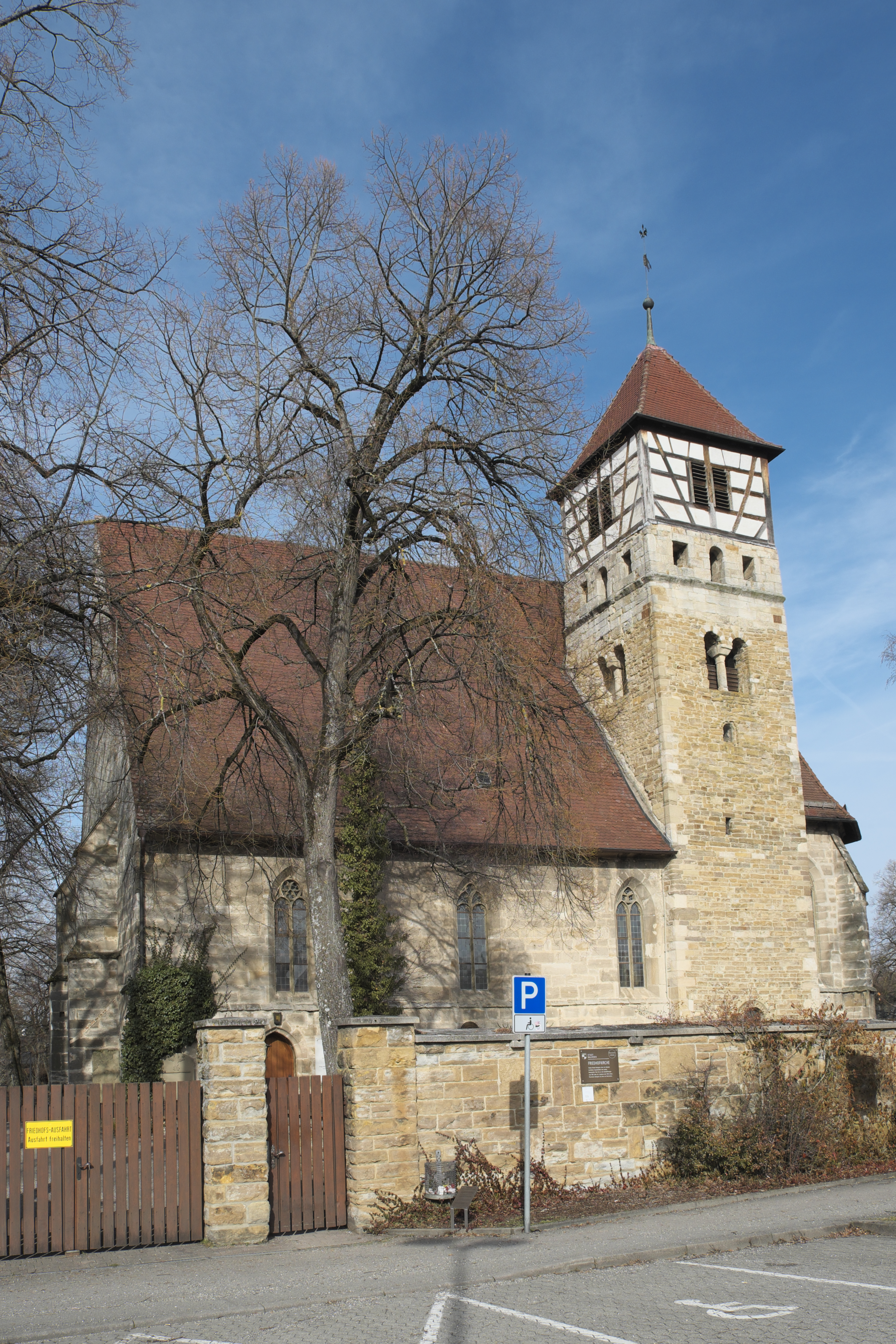 Evangelische Friedhofkirche in Balingen im Zollernalbkreis (Baden-Württemberg/Deutschland)